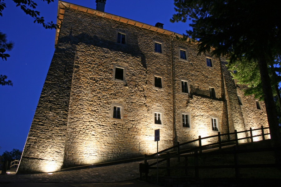 La Rocca di Montefiorino, province of Modena, Emilia-Romagna, Italy